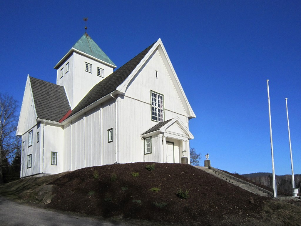 Eidsfoss kirke i Hof i vestfold